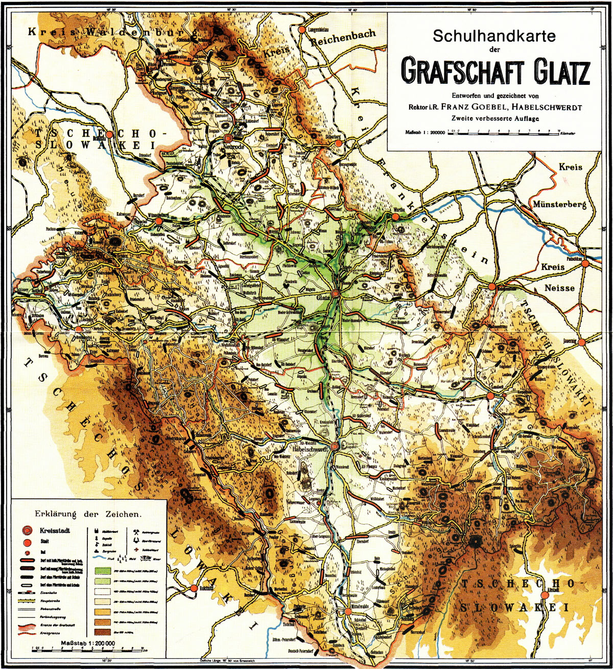 Schulhandkarte der Grafschaft Glatz